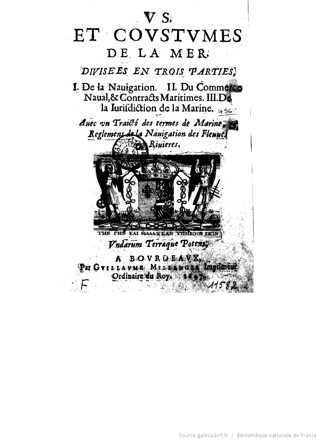 Page de garde de l'ouvrage d'Etienne Cleirac : Us & coutumes de la mer 1647